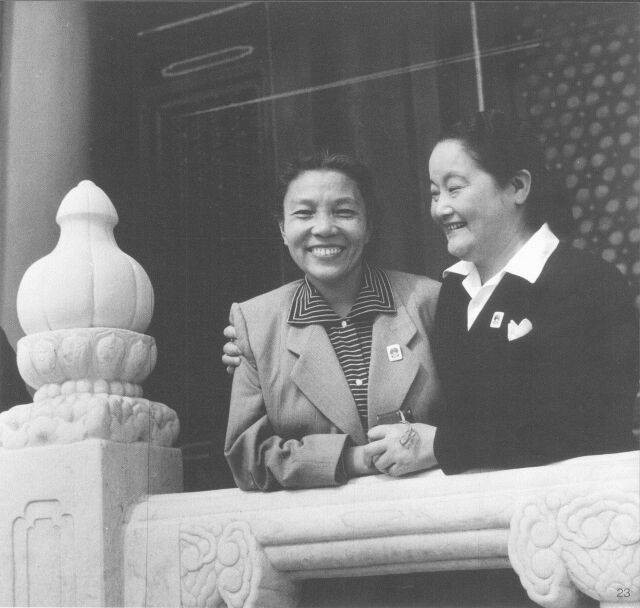 1950年，蔡畅和史良在天安门城楼上